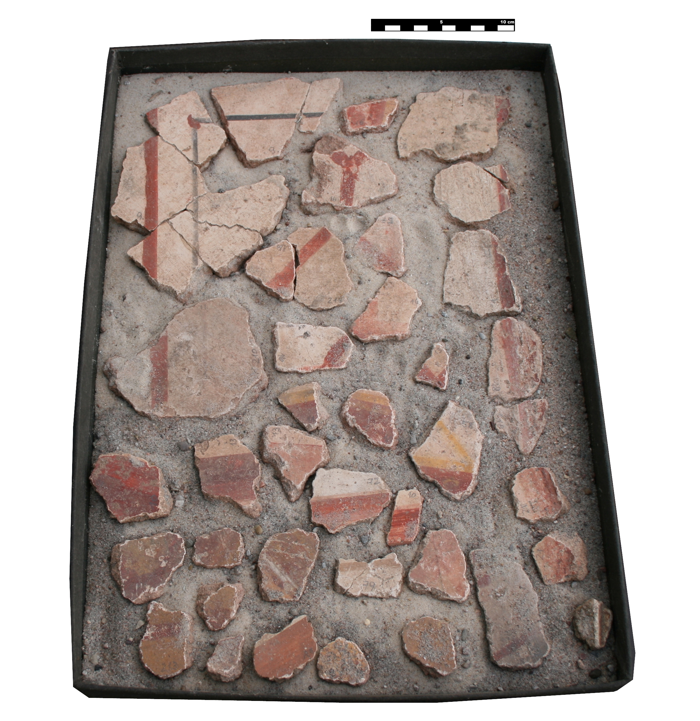 Römische Villa Haselburg im Odenwald, Hessen, Reste römischer Wandbemalung, gefunden im Fundamentbereich des Hauptgebäudes.